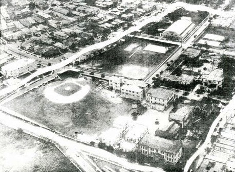 Vista aérea de los terrenos de Candler y Buenavista, en la Ceiba, Marianao, Cuba